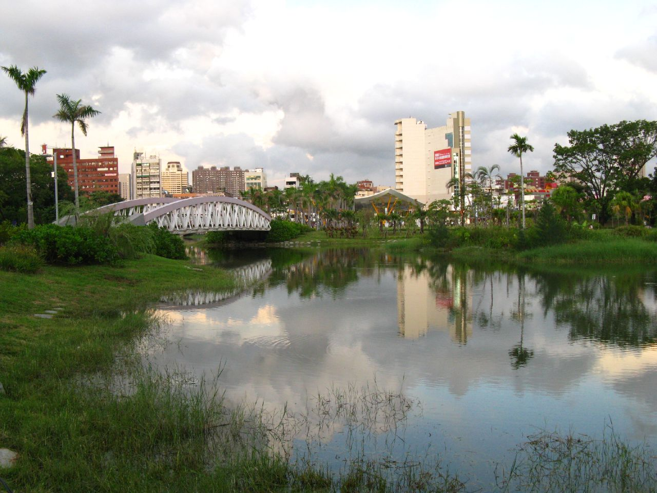 Central Park, Kaohsiung